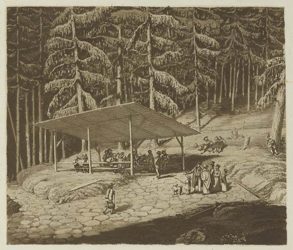 Schwarzbrünnlein beim Gurnigelbad, Kanton Bern, Schweiz